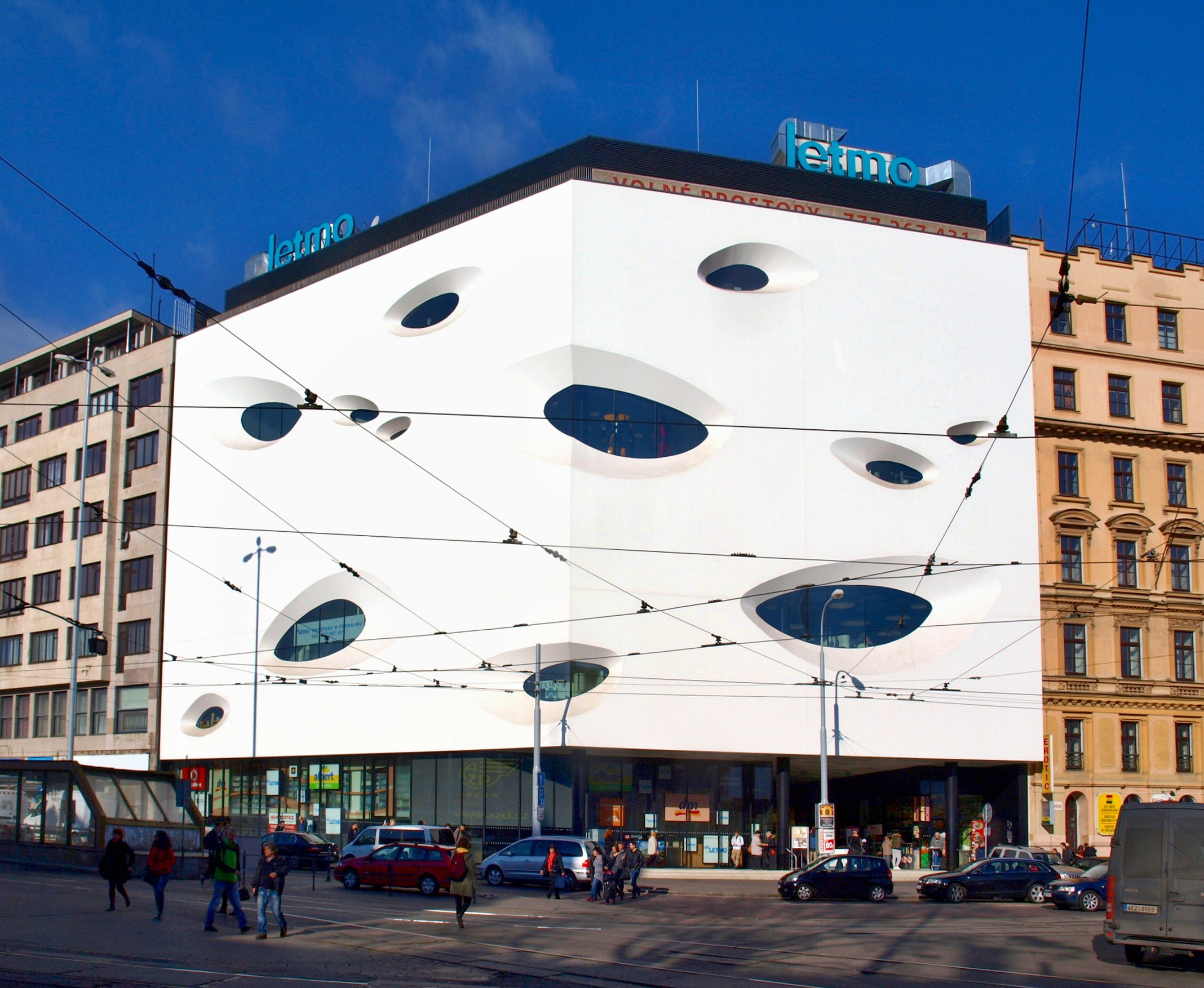 LETMO